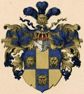 Zimmermanni suguvõsa aadlivapp